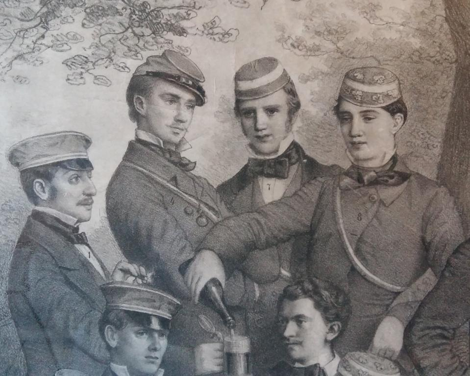 Semesterlithographie des Corps Hansea Bonn, Wintersemester 1854/55 (Ausschnitt), mit Heinrich von Kusserow (zweiter von rechts, Nr.7)